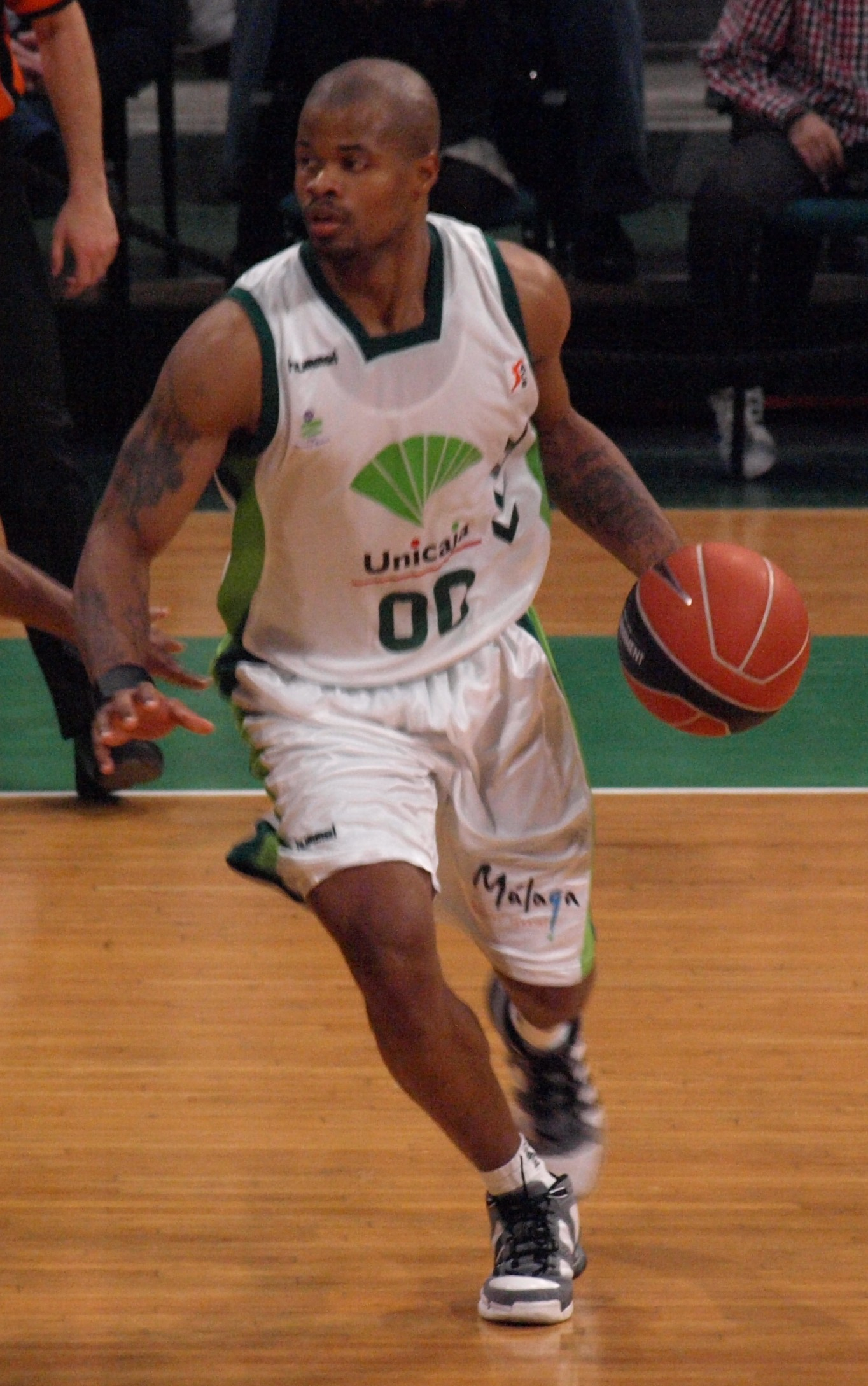 Omar Cook, en el partido que enfrentó al al Unicaja Málaga y al DKV Joventut de liga ACB en el Olímpico de Badalona en 2009